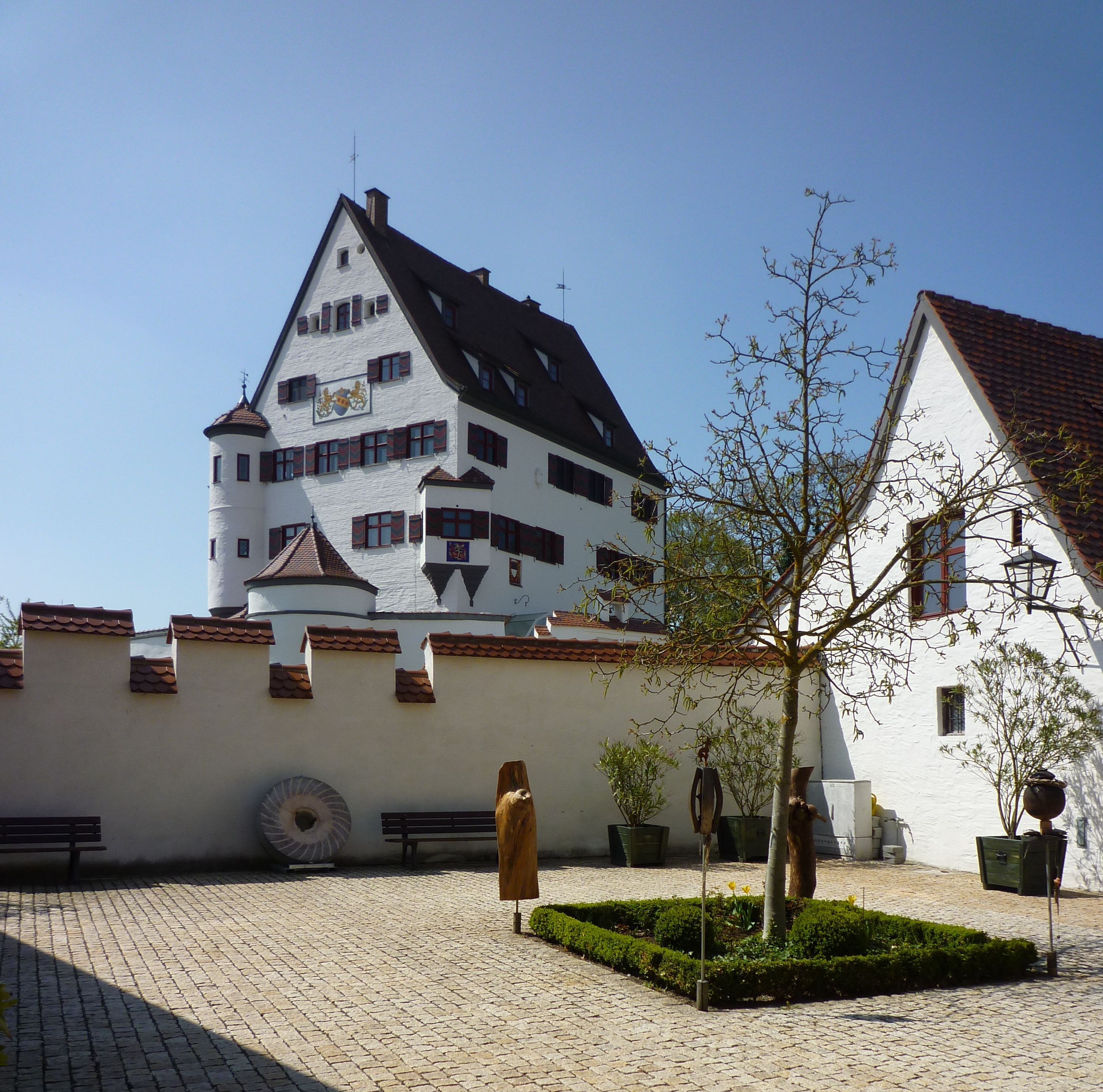 Leipheim - Schloss